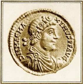 Magnus Clemens Maximus Augustus